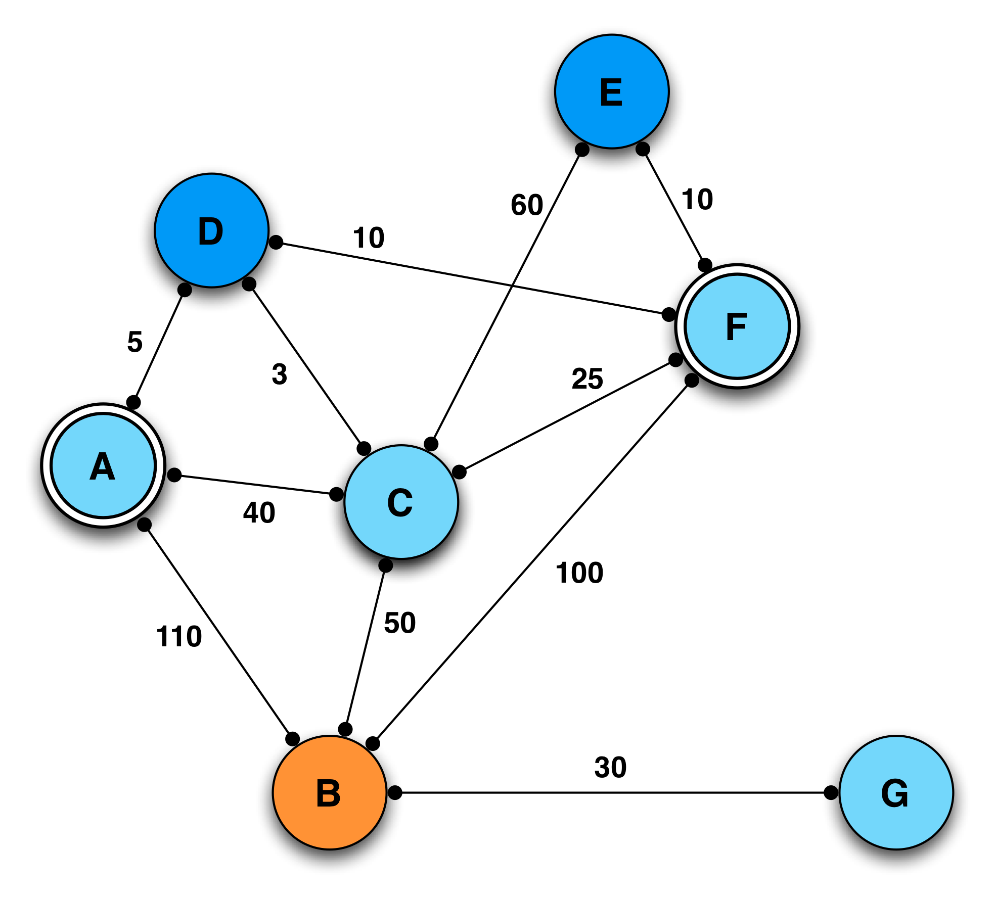 QoS - Algo OLSR modifié, version 1